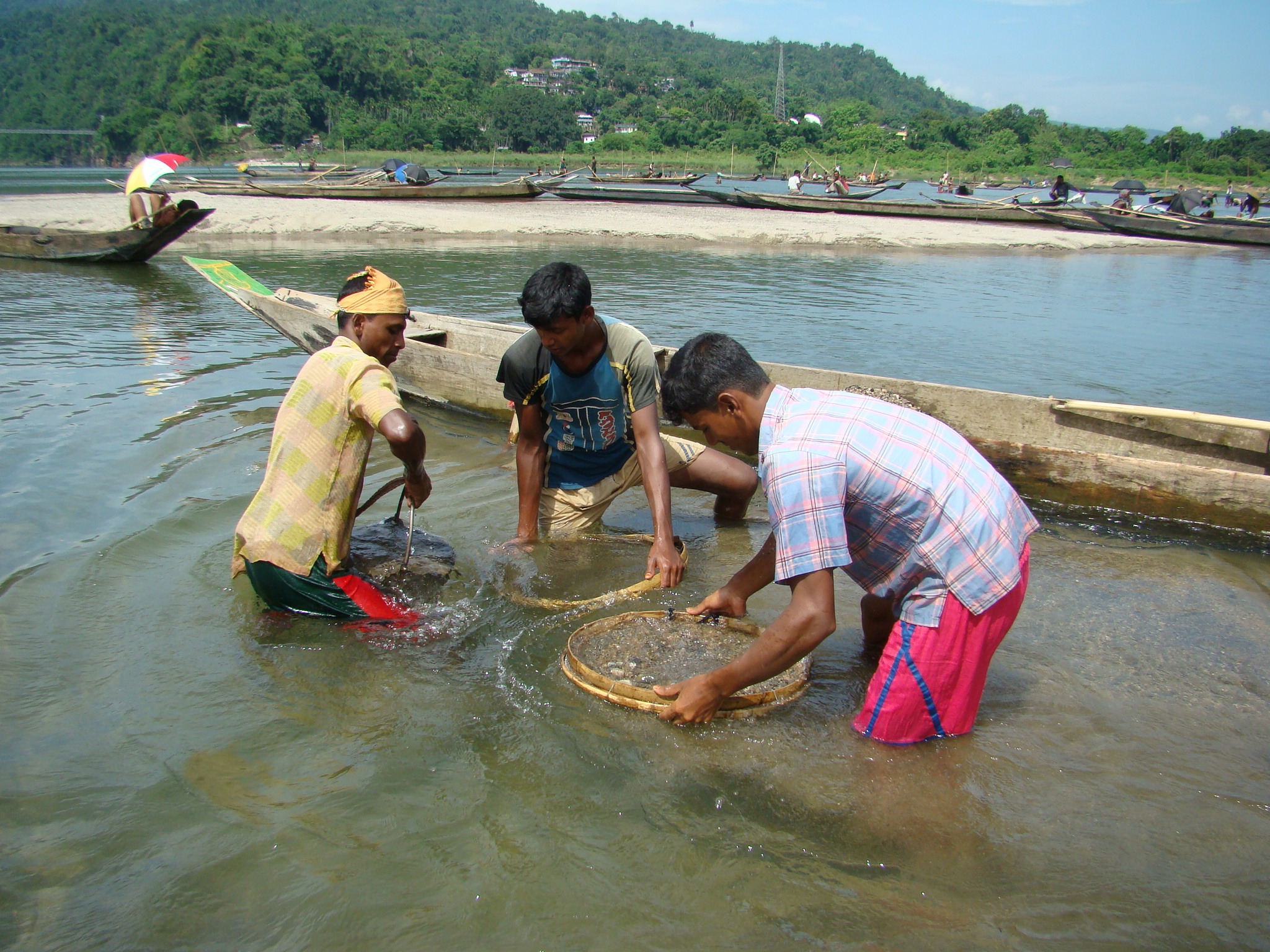 Jaflong Sylhet Bangladesh